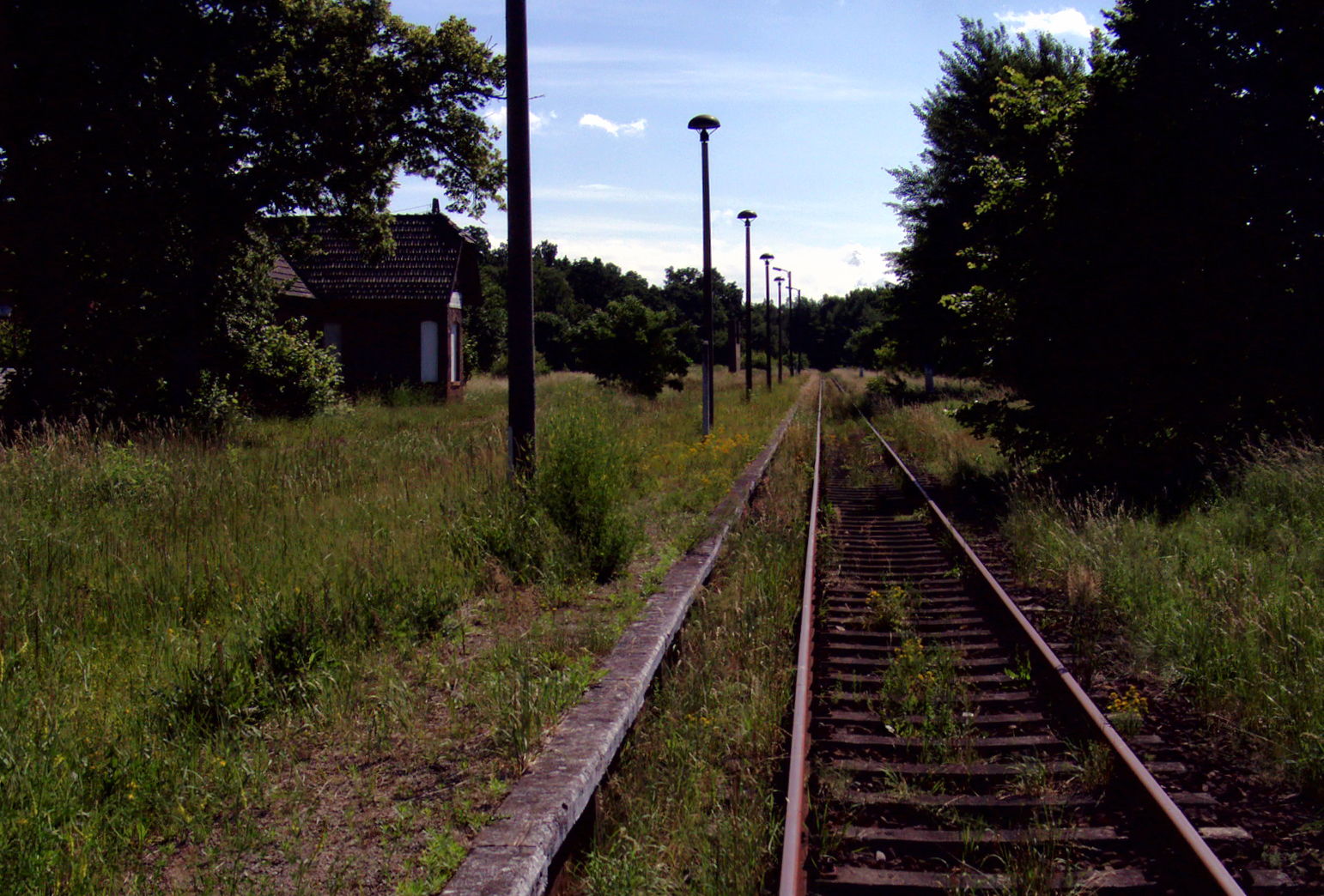 ehemaliger Bahnhof Leuenberg an der Wriezener Bahn